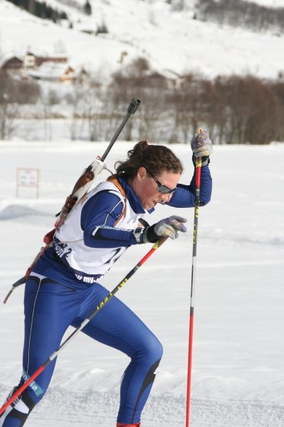 See Title